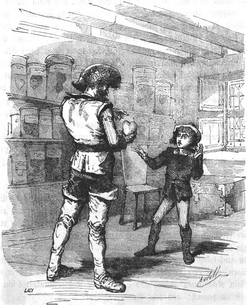 Szene aus dem Märchen Das kalte Herz von Wilhelm Hauff: Der Holländer-Michel schlägt Peter Munk vor dessen „warmes Herz“ durch ein kaltes, steinernes Herz auszutauschen.